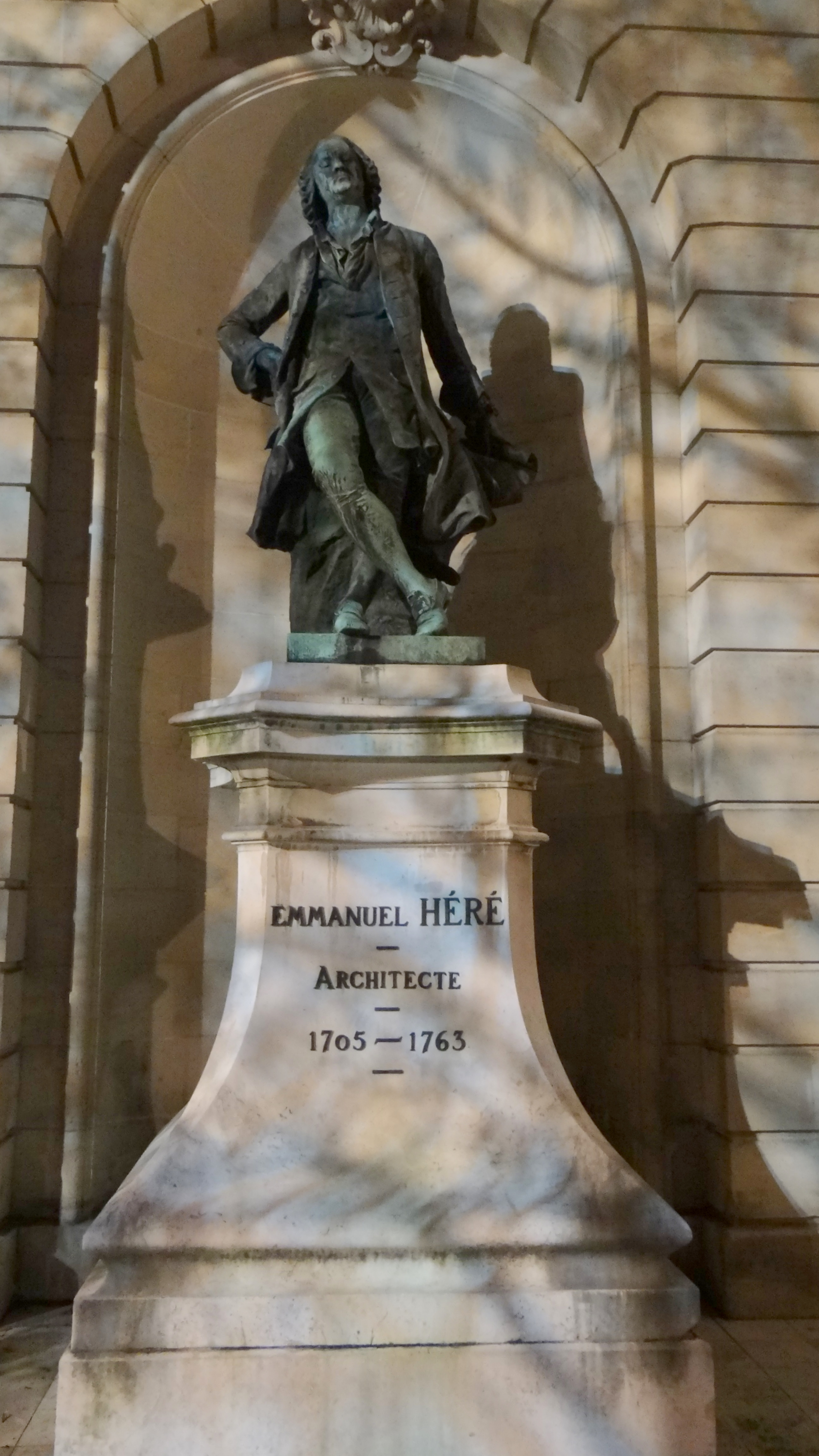 Léopold Emmanuel Héré de Corny